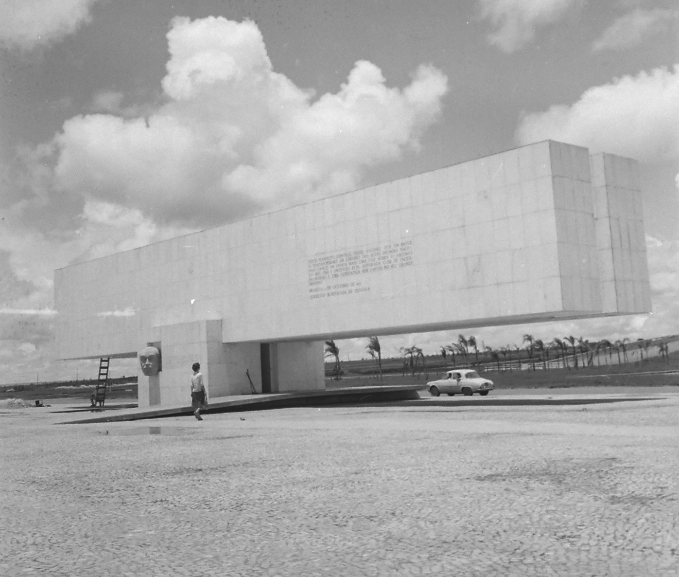 Imagem do Fundo Agência Nacional, do Arquivo Nacional